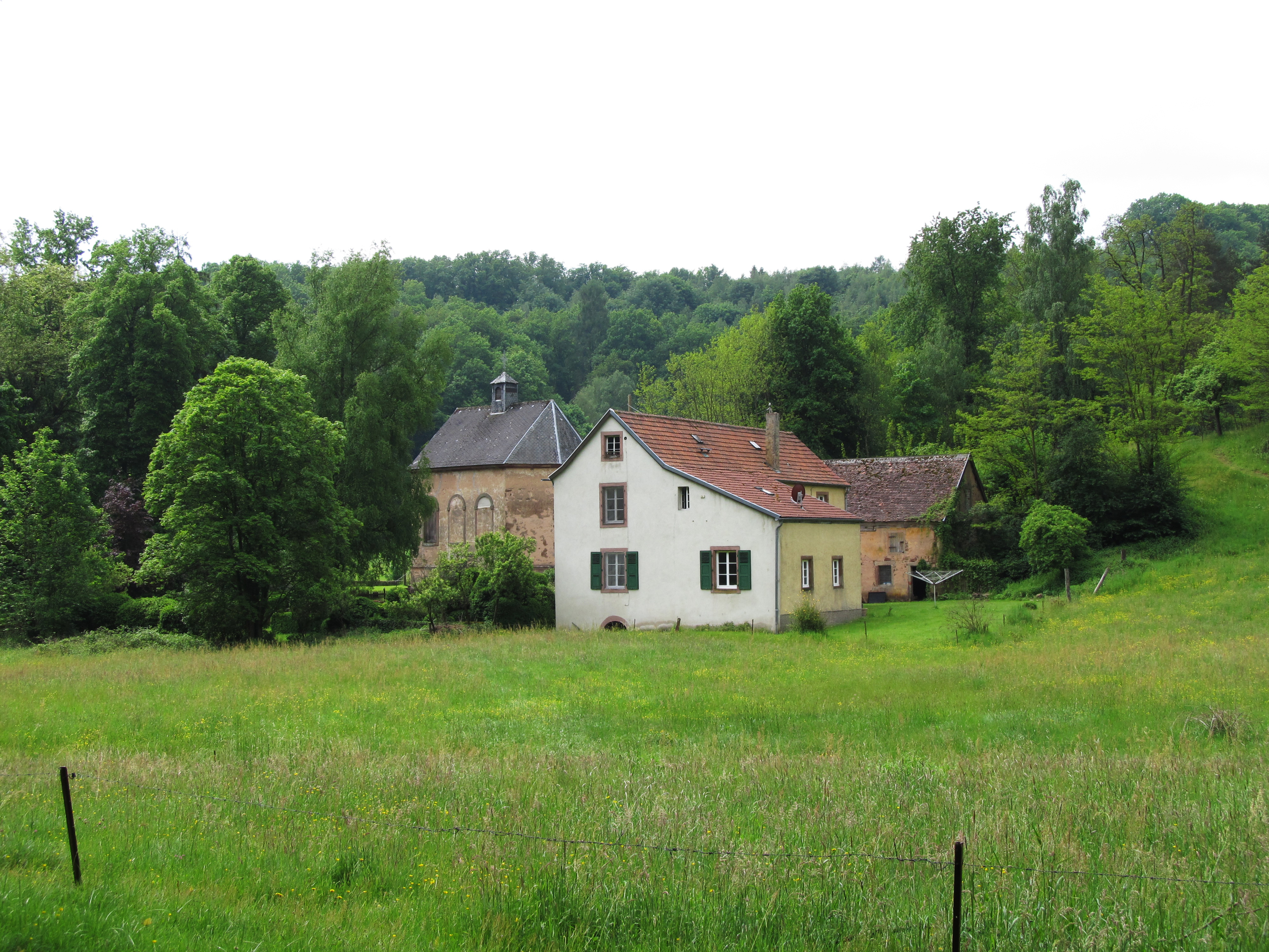 Blick auf Wirtschaftsgebäude und die Kapelle von Schloss Gutenbrunn